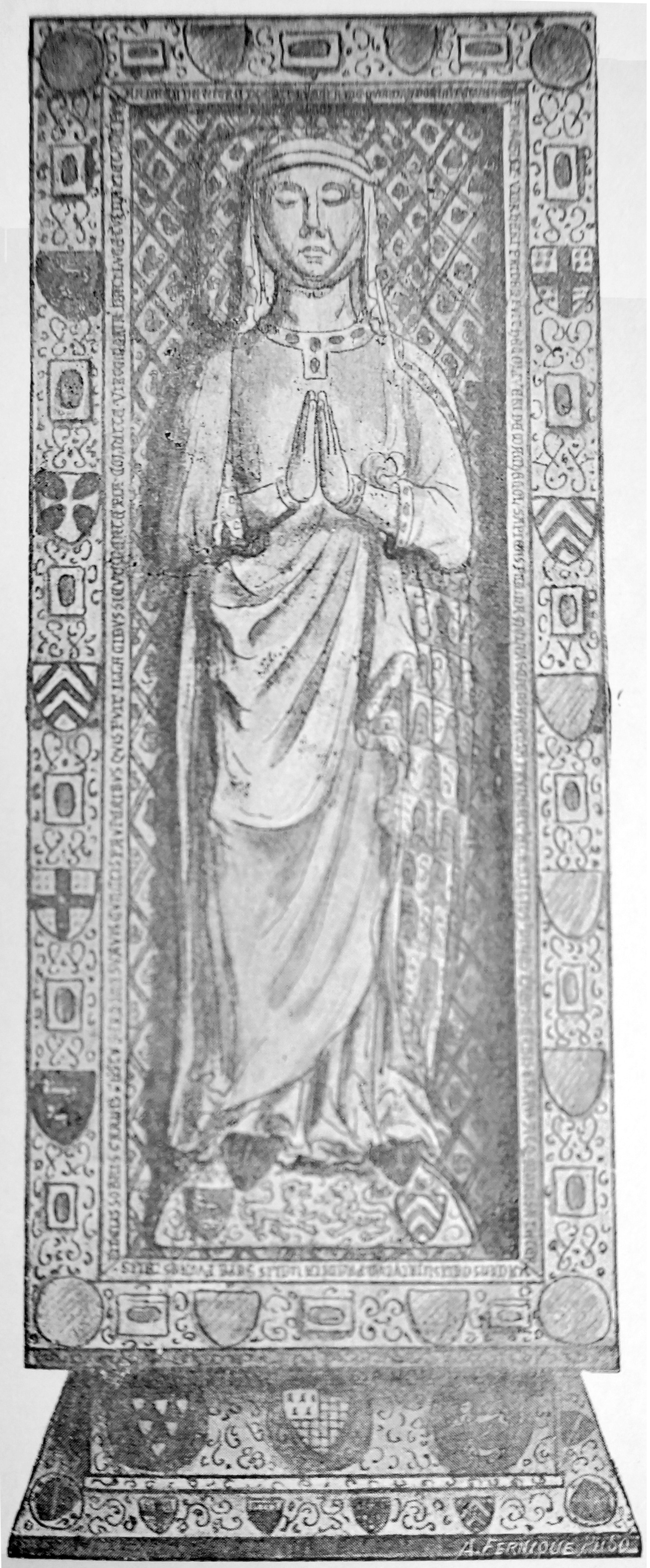 Gisant d'Eustachie de Vitré dame de Machecoul. Relevé d'après aquarelles de Roger de Gaignières.